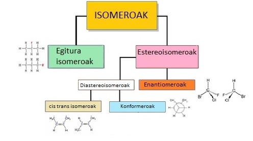 isomeroen eskema laburra